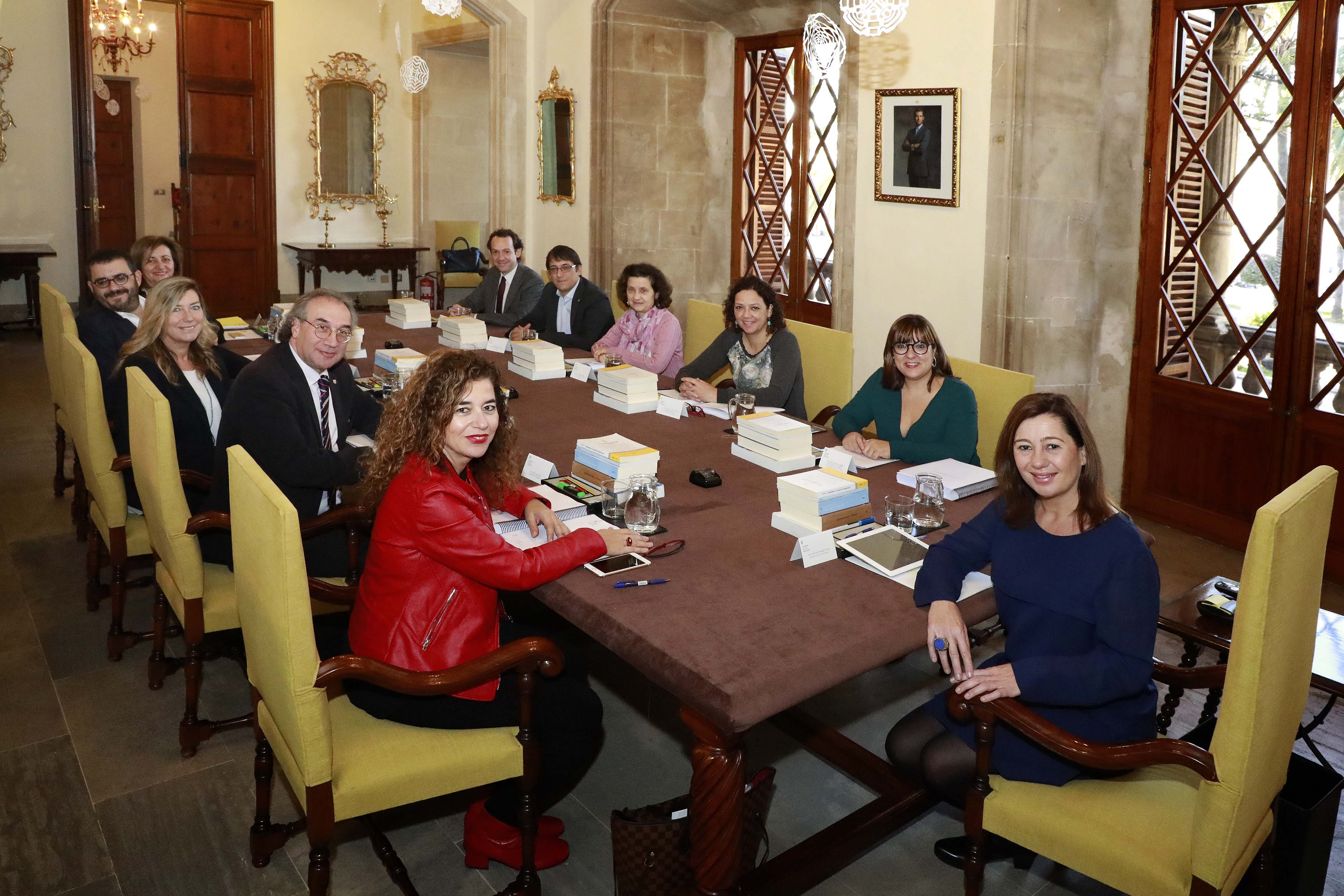 Consell de Govern de les Illes Balears després de la remodelació al desembre de 2017